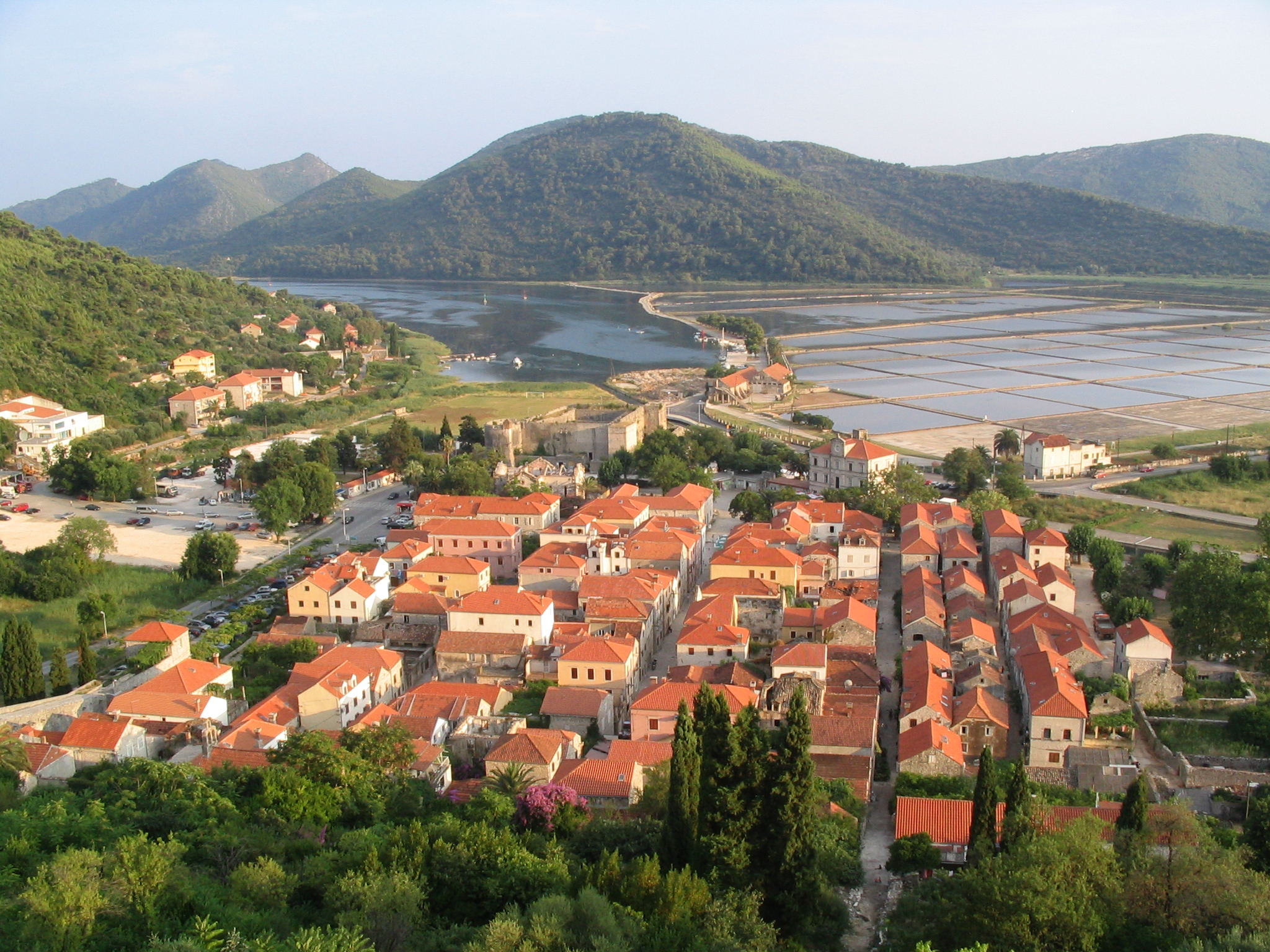 Panorama Stona.